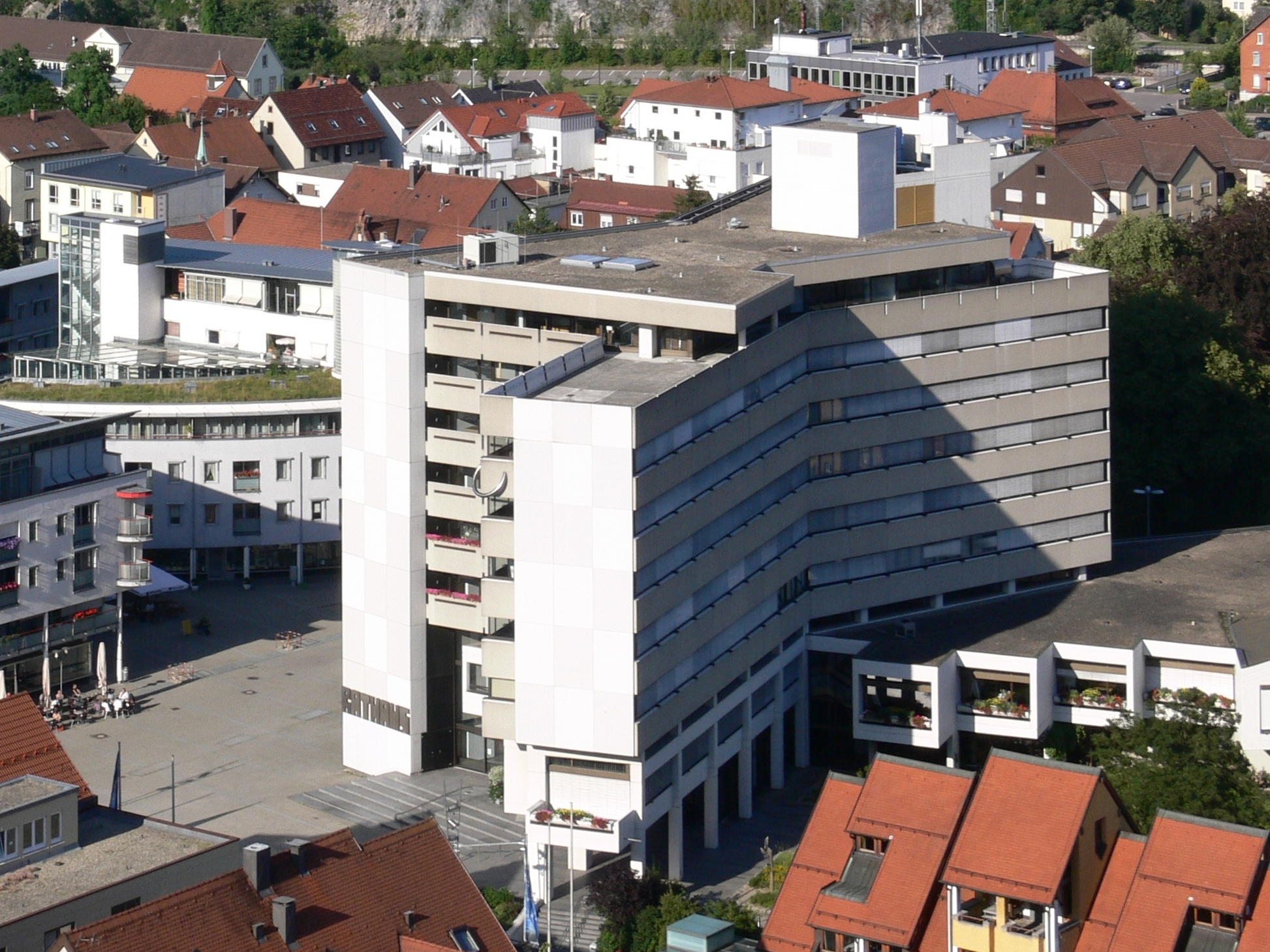 Heidenheim an der Brenz Rathaus, Blick von Schloss Hellenstein